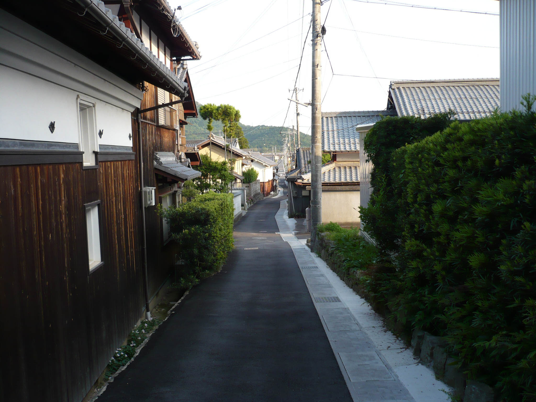 石寺楽市